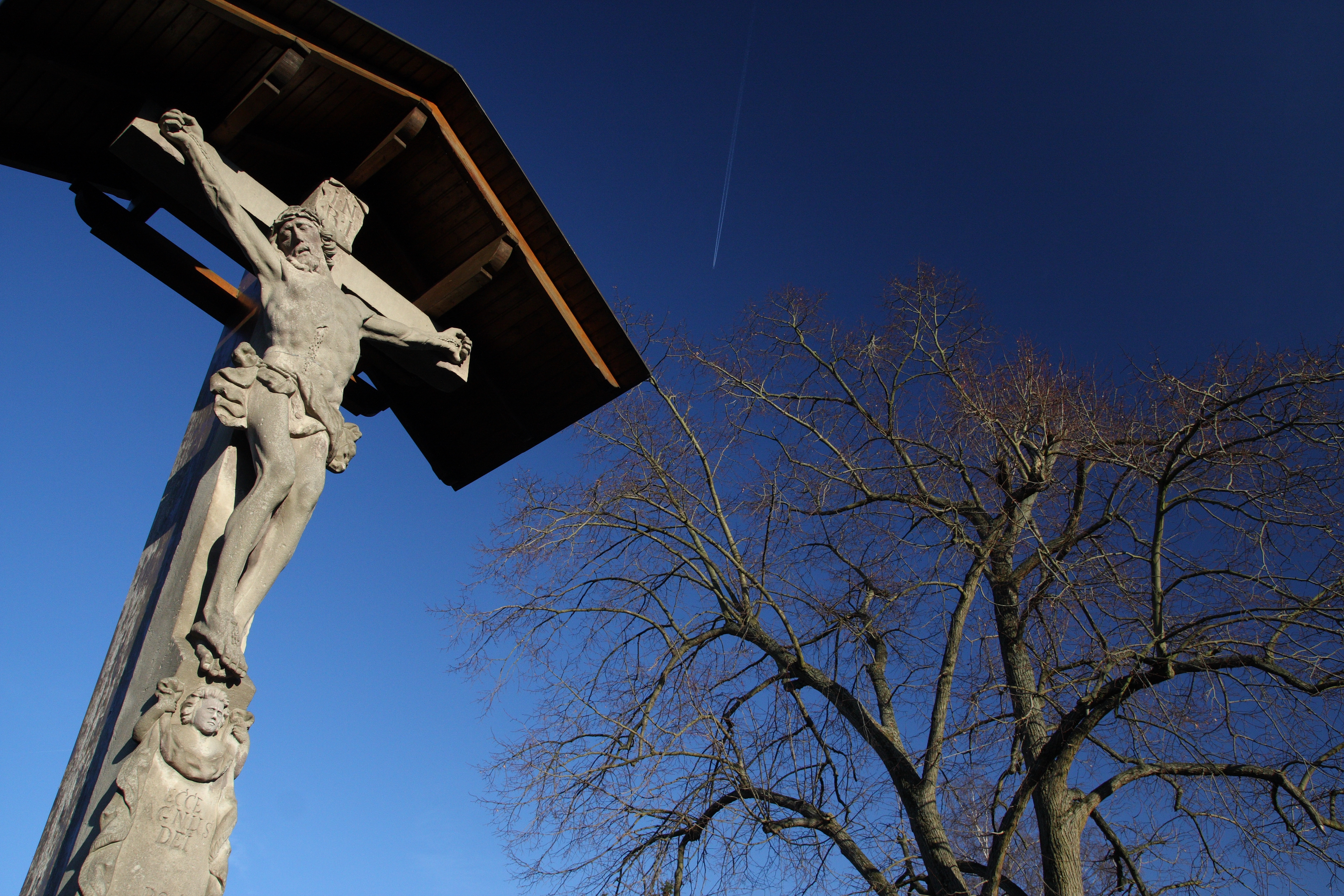 Lindau, Germany